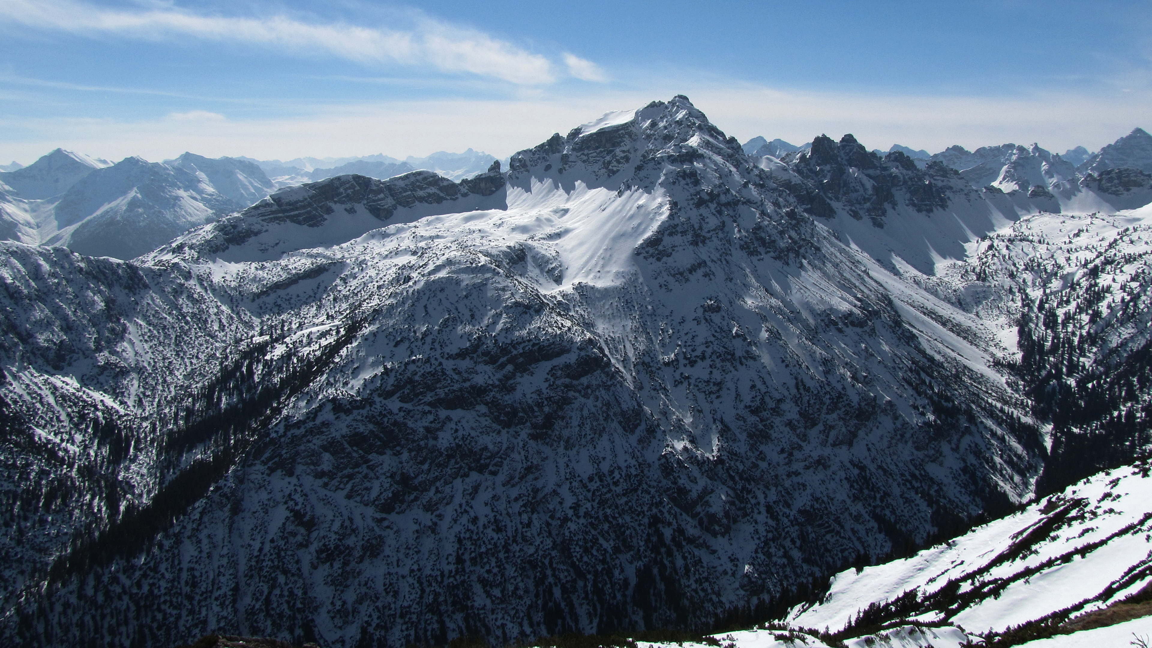 Blick vom Aufstieg zum Litnisschrofen nach Süden zur Leilachspitze (2274 m). Umgeben ist der Gipfel links vom Weißenbacher Notländ und rechts von den Krottenköpfen (2180 m) und dem Gappenfelder Notländ.